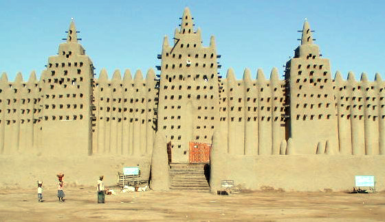 Déi grouss Moschee zu Djenné.